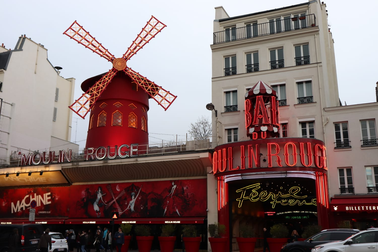 Moulin Rouge pelikulari omenaldia egiteko Parisen dagoen errota gorria